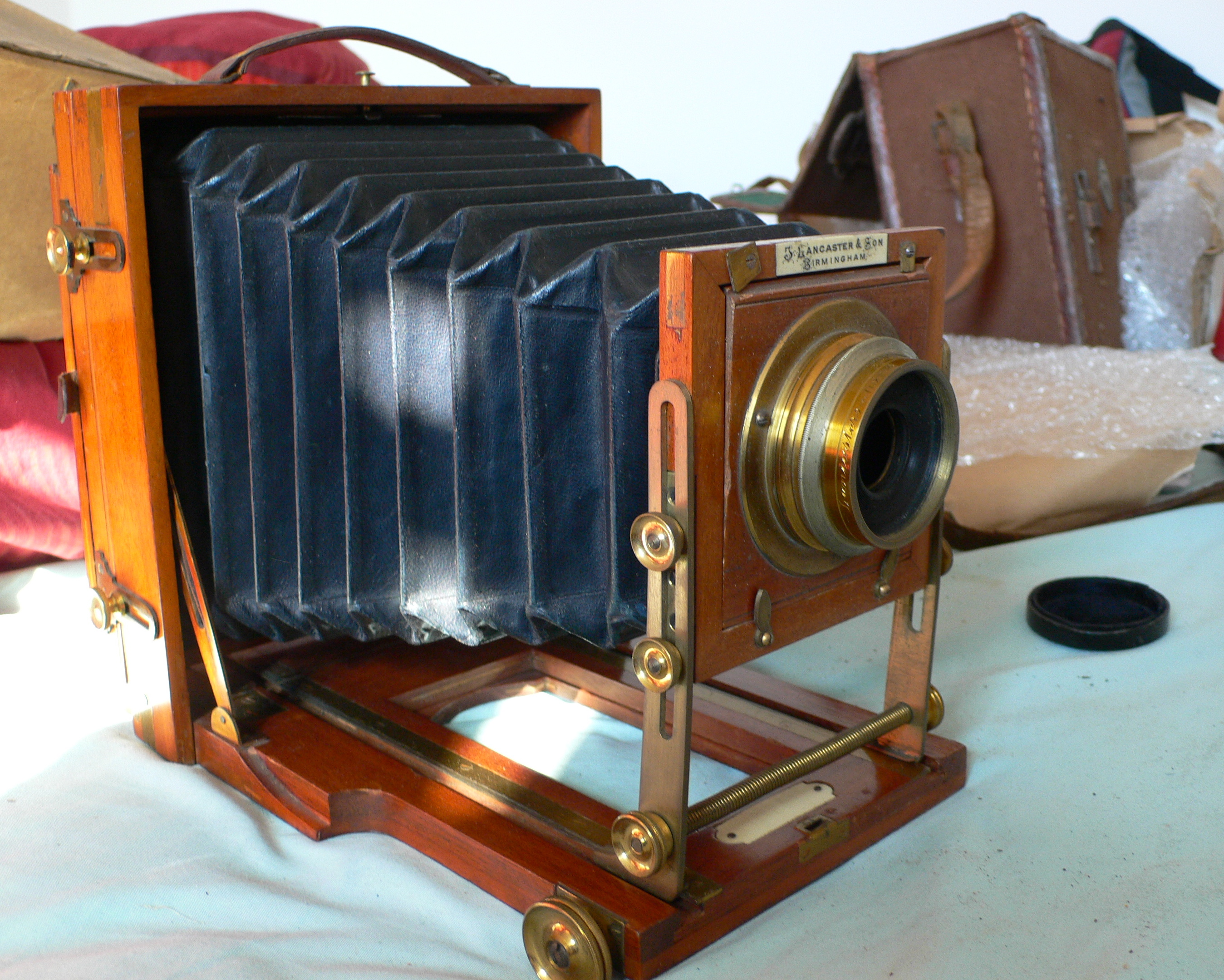 unfolded